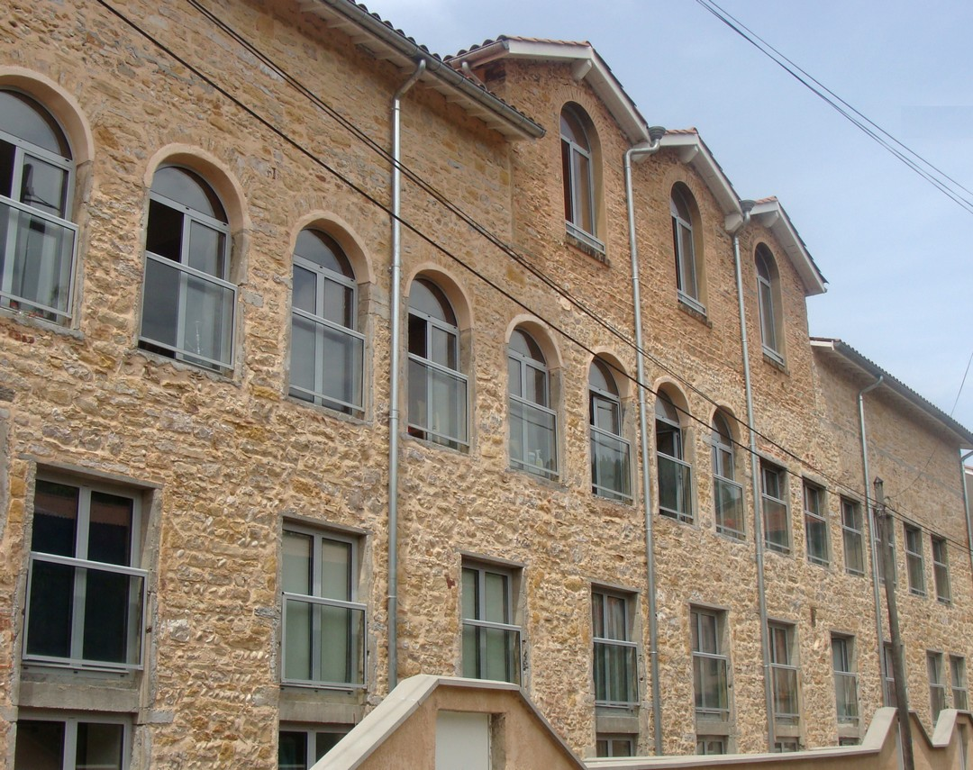 Neuville-sur-Saône (Rhône) : une ancienne fabrique voisine du torrent des Torrières, réhabilitée en logements et bureaux.